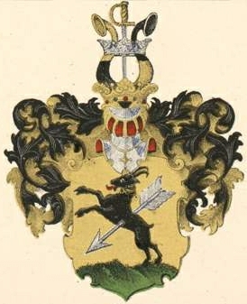 Rammi suguvõsa aadlivapp